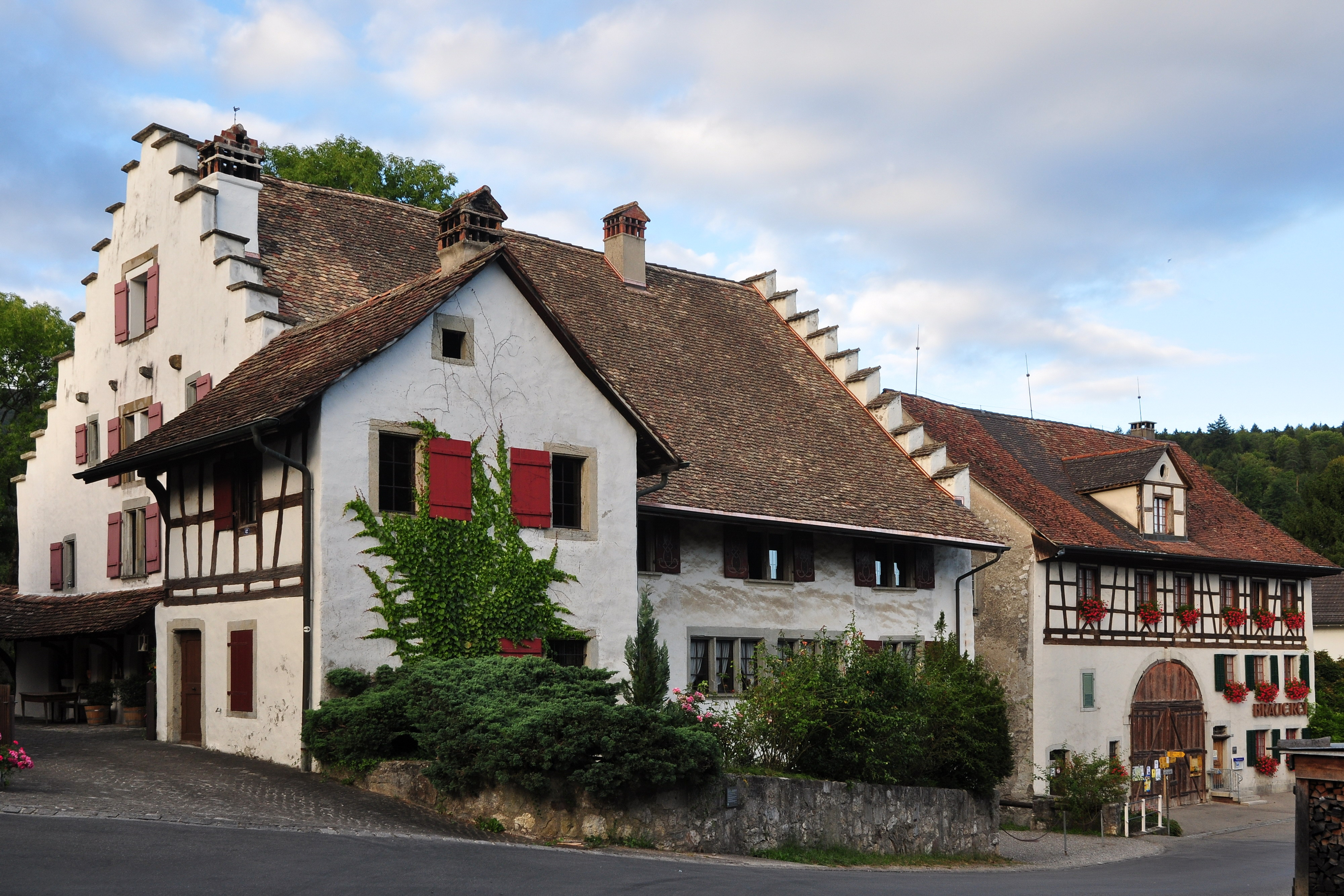 Untermühle mit ehemaliger Brauerei, Mühlegasse 2 in Otelfingen (Switzerland)